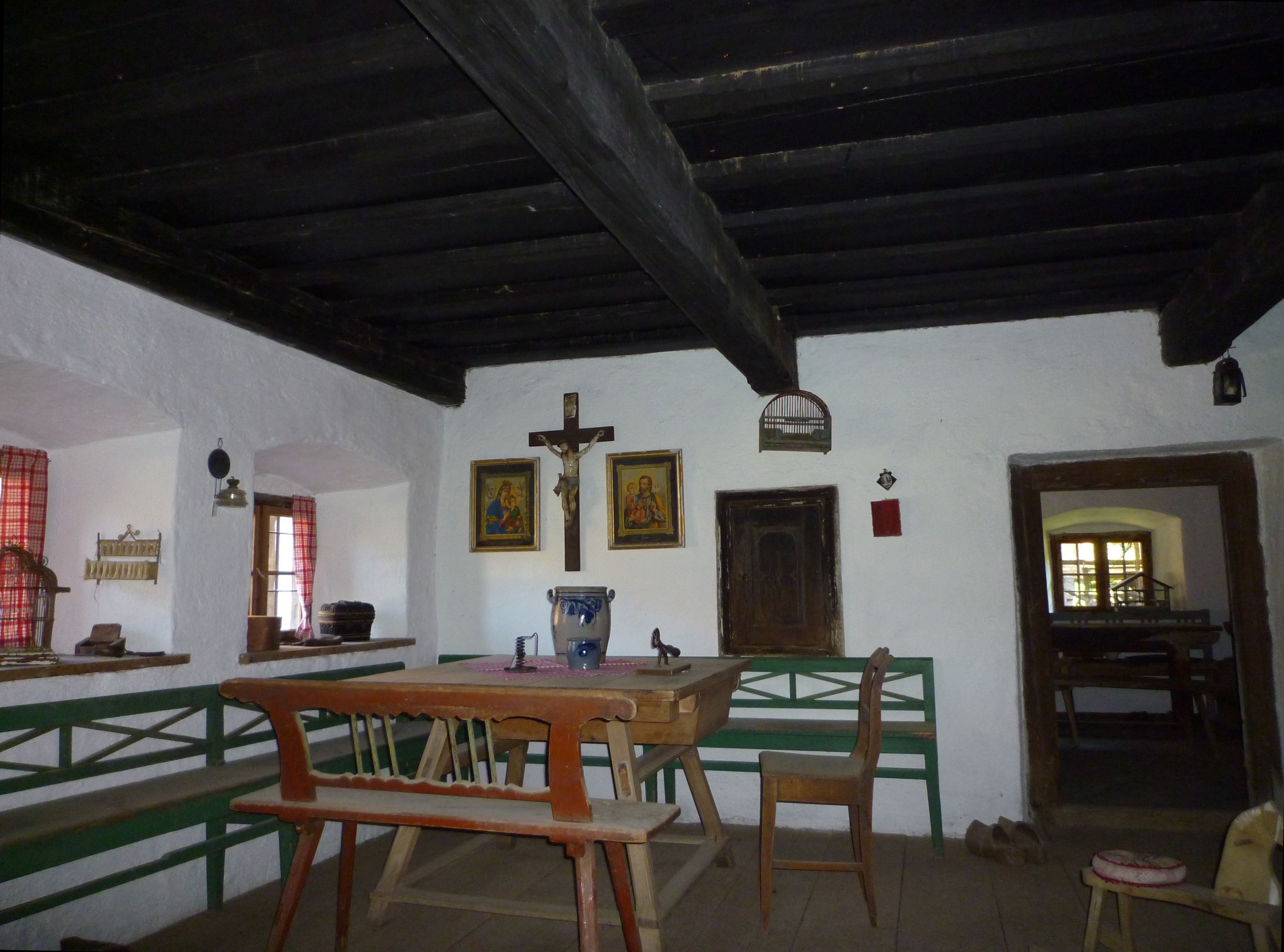 Tittling - Im Museumsdorf Bayerischer Wald, Zaigergut ab 1430